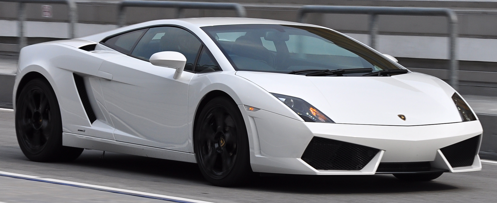 Lamborghini Gallardo LP560-4.